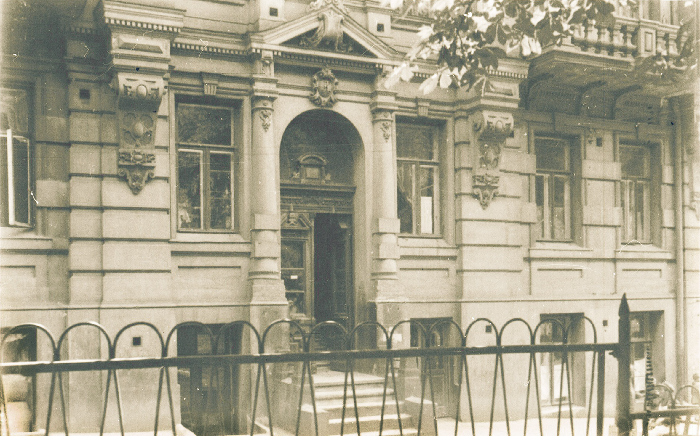 Садиба міська, в якій проживав Глієр Р. М., Київ, вулиця Антоновича, 23